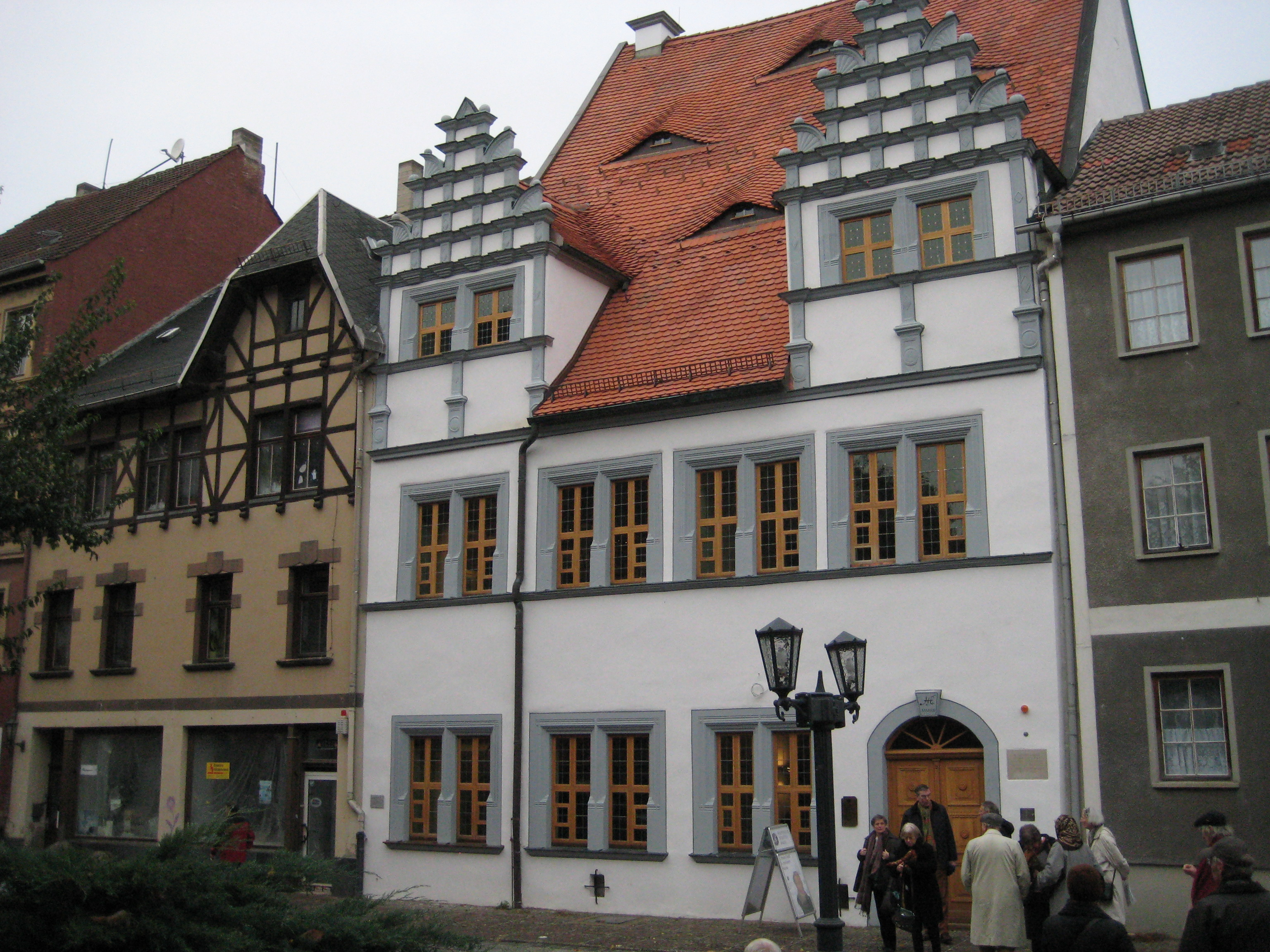 Museum "Heinrich-Schütz-Haus" in Weißenfels